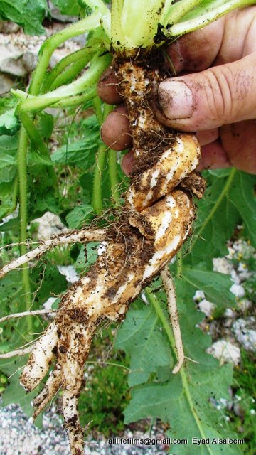 نبات برّي سوري يؤكل